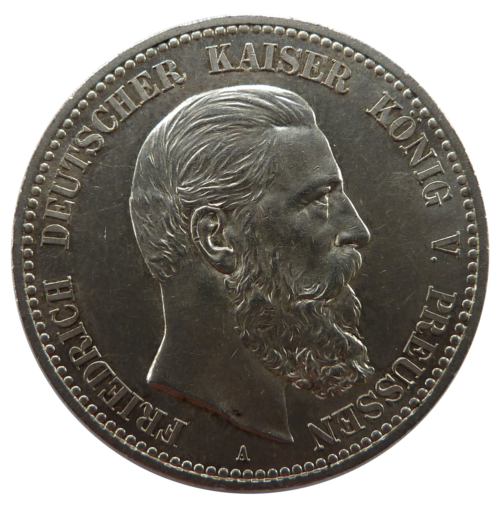 Vorderseite der 5-Mark-Münze Preußens mit dem Porträt Friedrichs III.